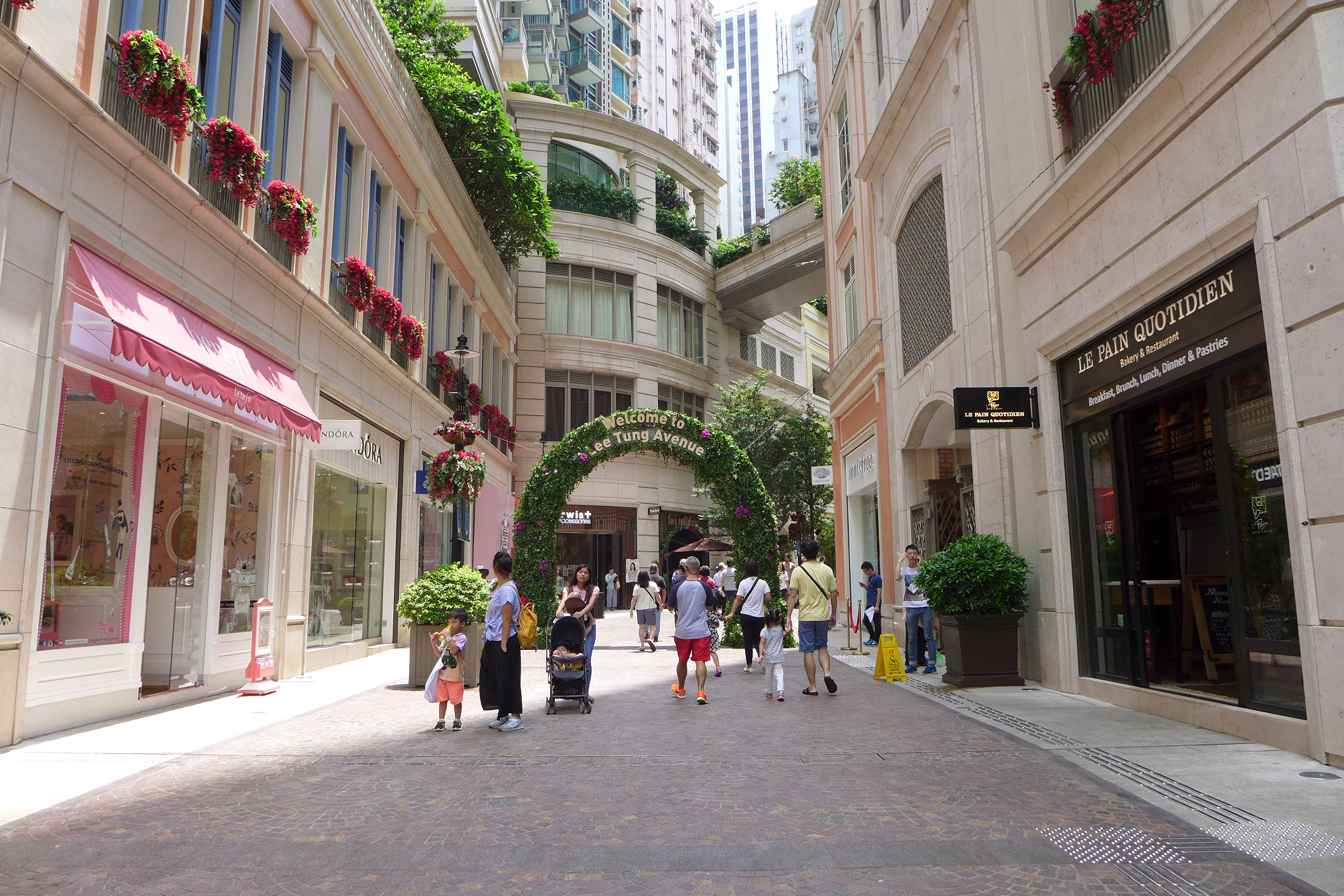 Lee Tung Avenue